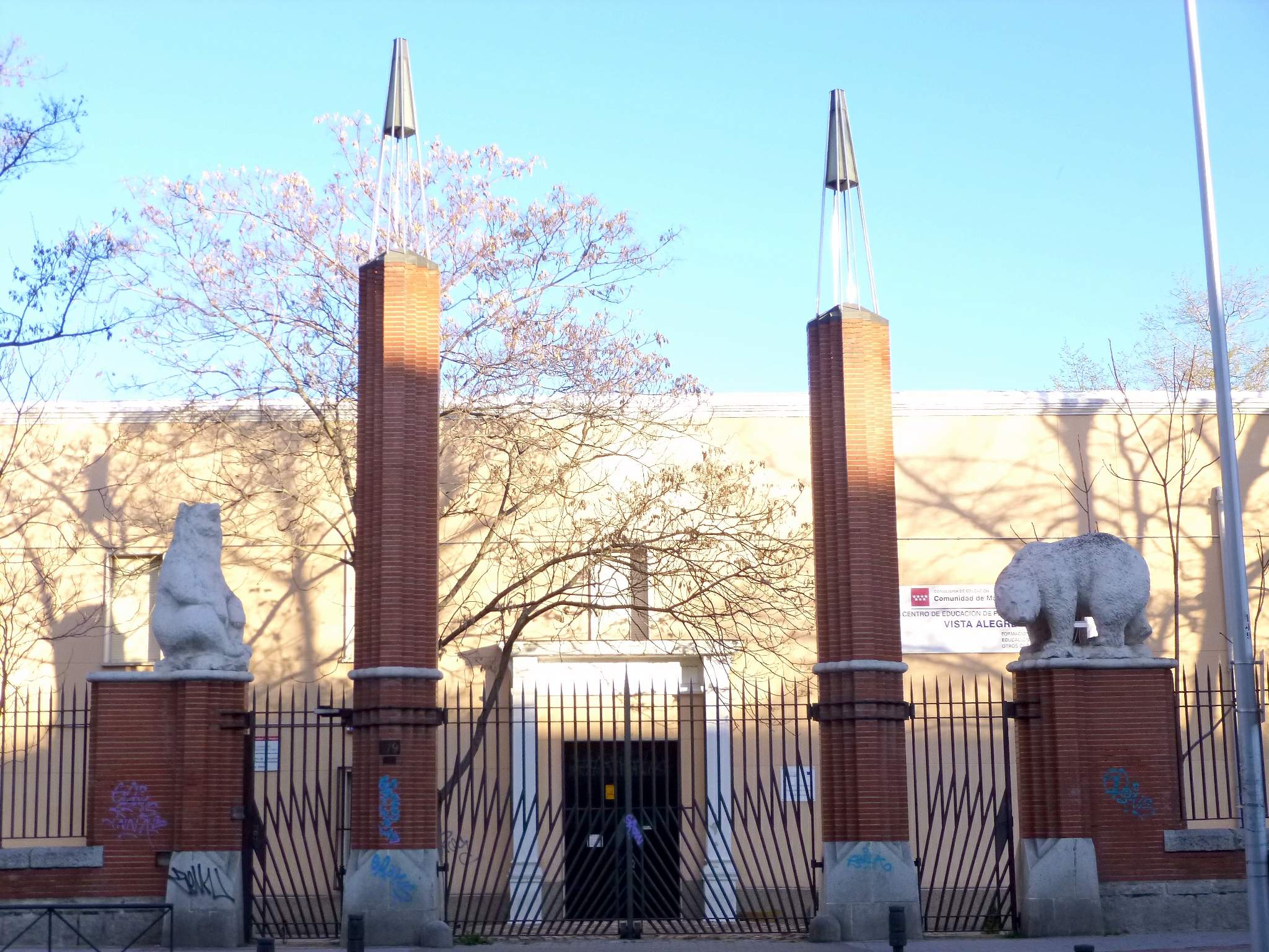 Centro de Educación de Personas Adultas Vista Alegre (Carabanchel, Madrid9